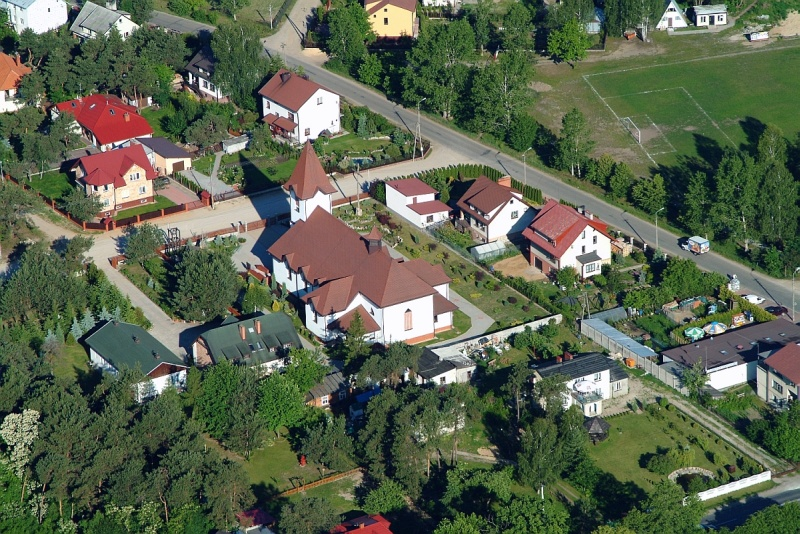 zdjęcie lotnicze - kościół parafialny w Hucie Mińskiej